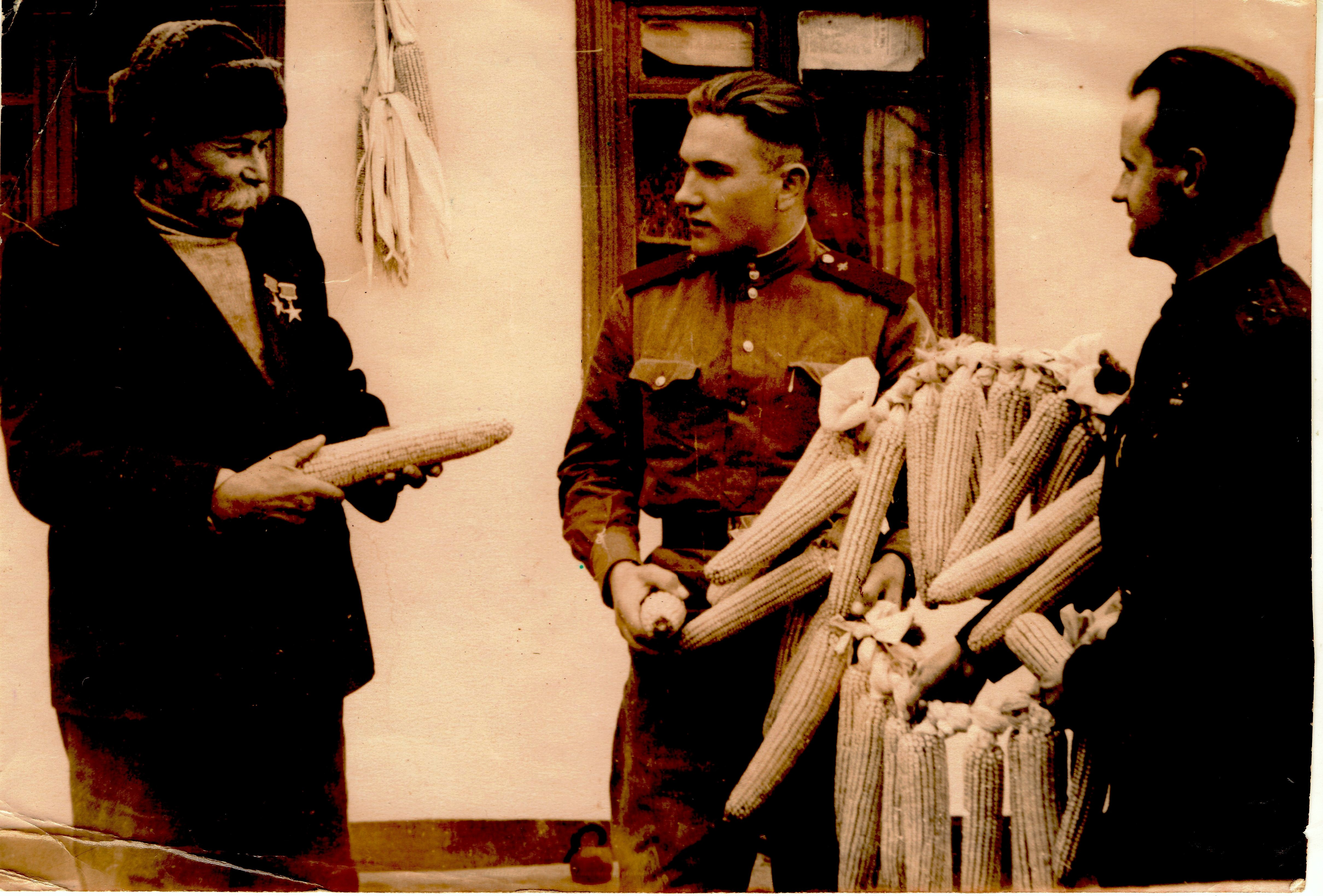 Євген Блажевський з воїнами-шефами Котовського гарнізону